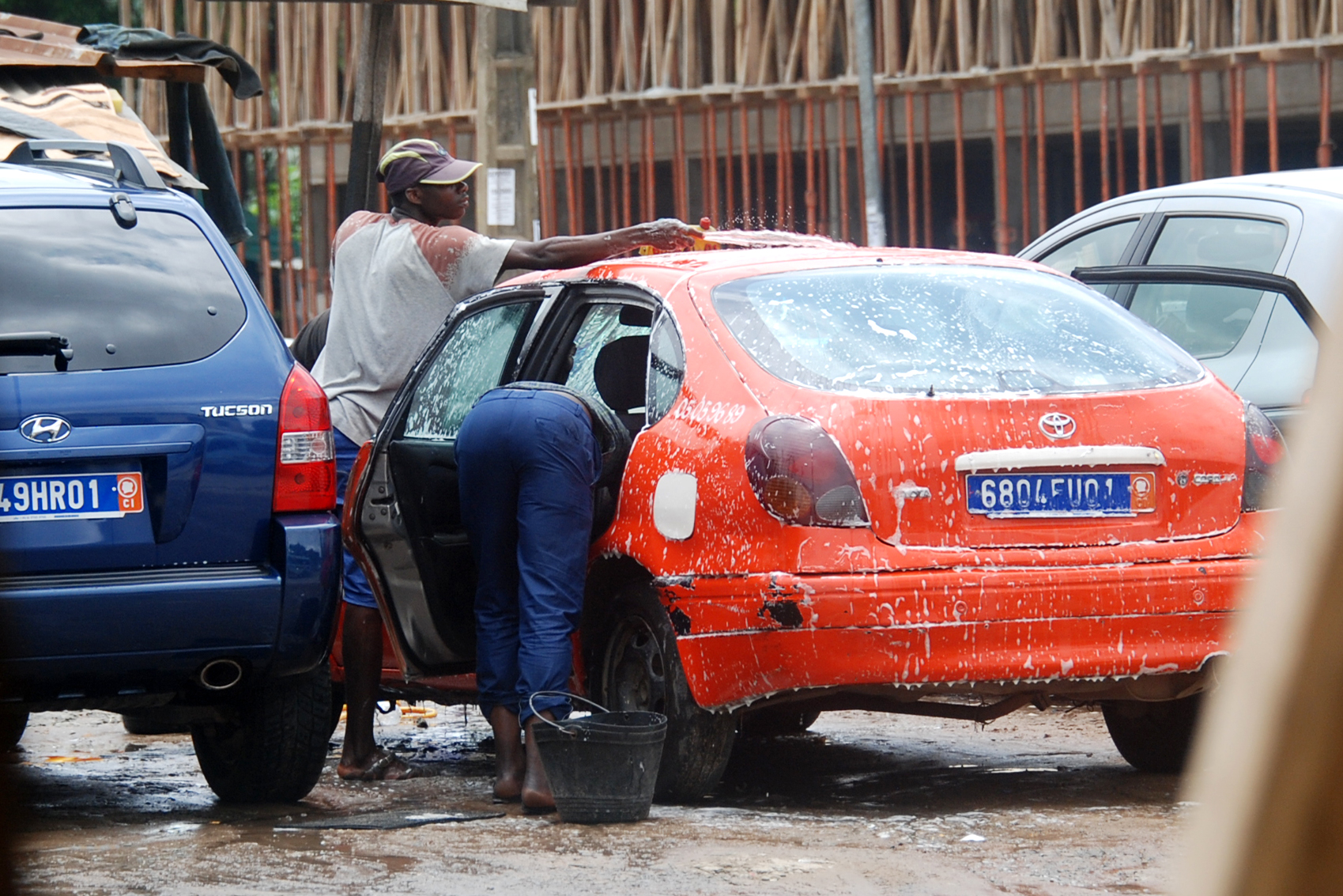 laveurs de véhicules automobiles dans un lave-auto à Abidjan This is an image of "African people at work" from Ivory Coast